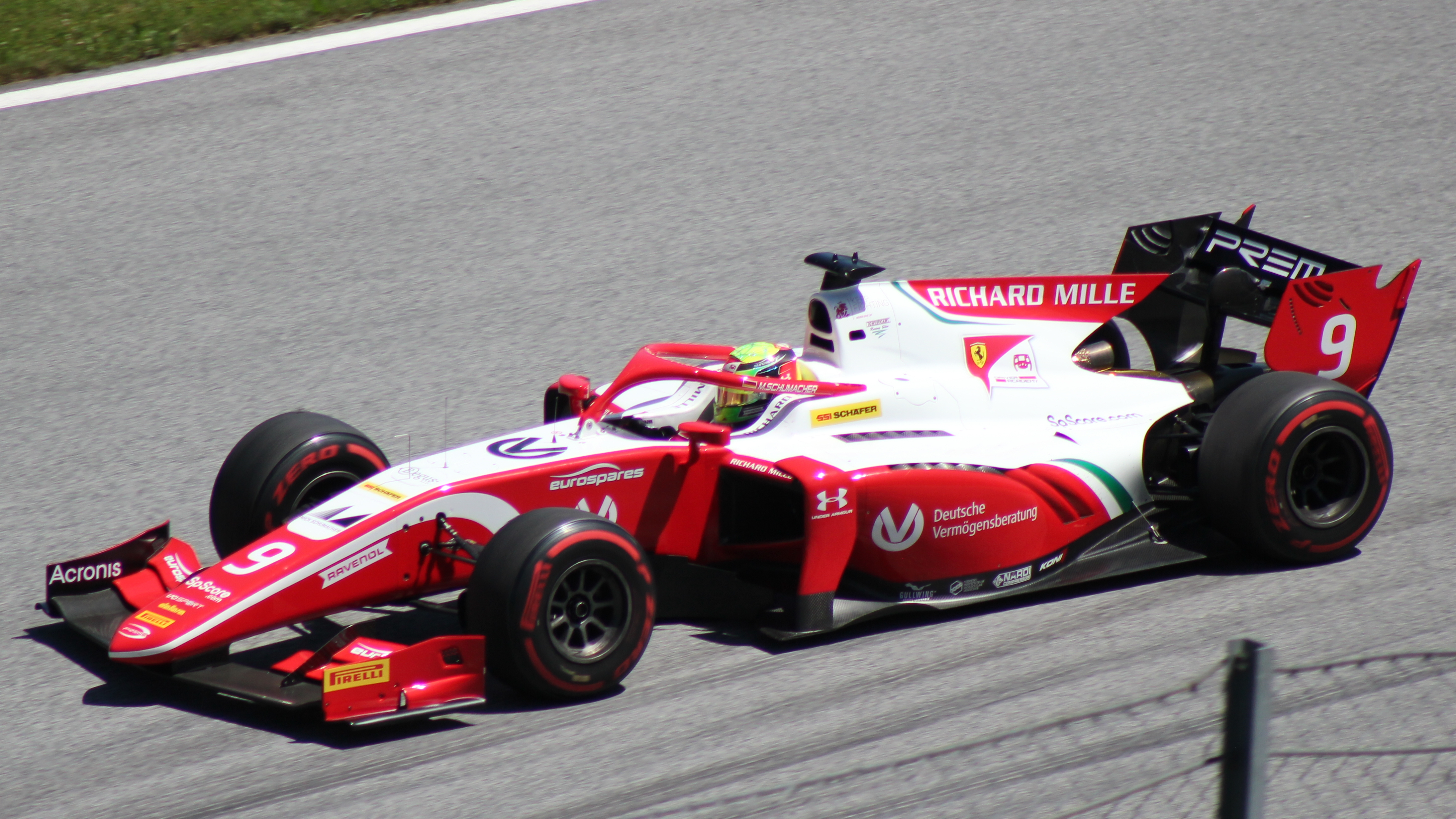 Mick Schumacher beim Rennwochenende in Österreich 2019